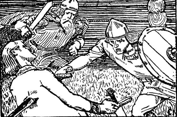 Christian Krogh: Illustration for Håkon jarls saga, Heimskringla 1899-edition. nn: «Klypp herse drep Sigurd Sleva.» nb: «Klypp herse dreper Sigurd Sleva.»